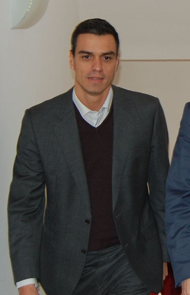 El diputado socialista Pedro Sánchez en una visita al presidente de CONFAES, Juan Antonio Martín Mesonero